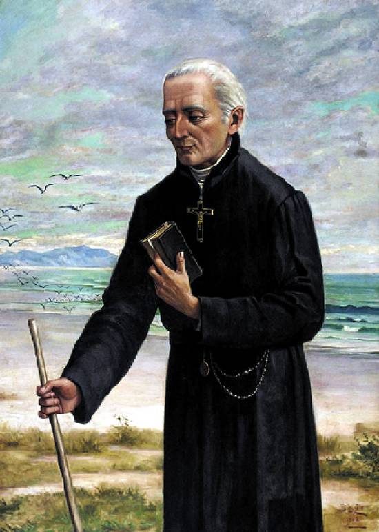 Benedito Calixto - Retrato do Padre José de Anchieta. Óleo sobre tela, 140 x 100 cm. Acervo do Museu Paulista.